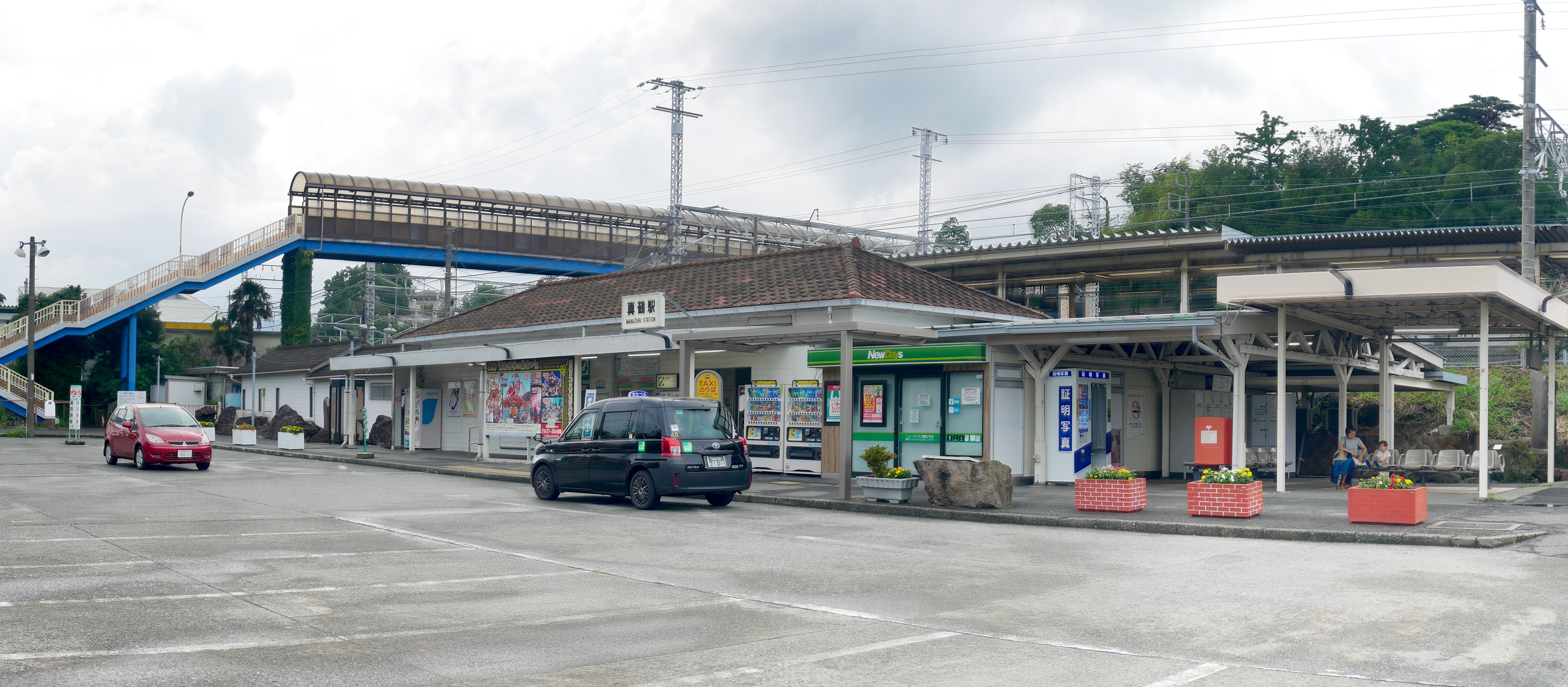 Manazuru Station (真鶴駅)